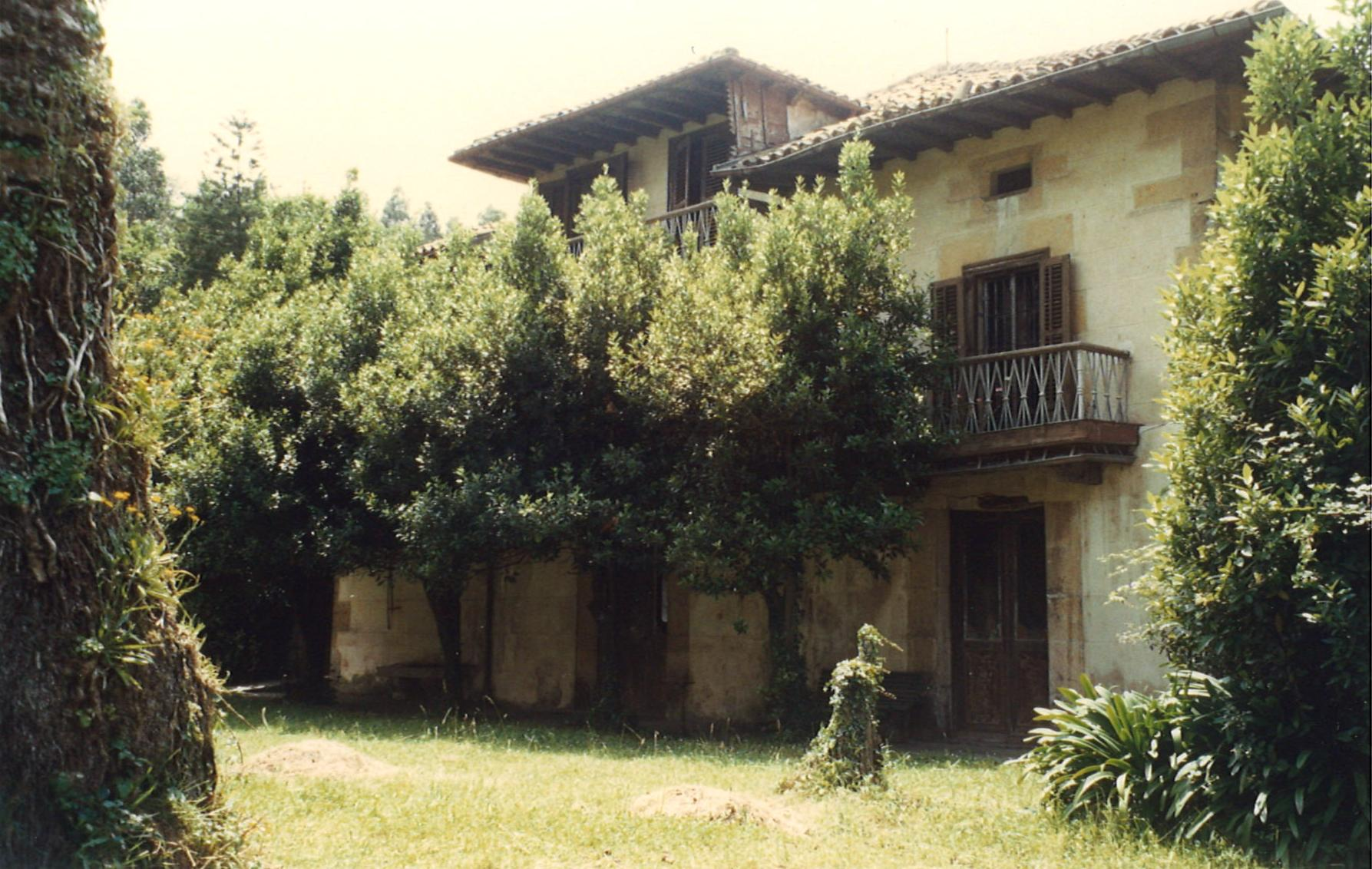 Condal Palace Mortera